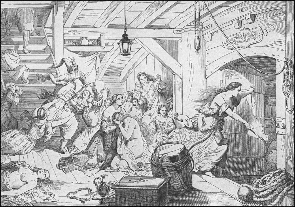 1570 – La capitale dell’isola, Nicosia, viene conquistata dai turchi. Si diffonde il terrore fra gli abitanti . – Fra i prigionieri, anche giovani matrone veneziane della città fra le quali Belisandra Maraviglia che pur di non cadere in mano agli infedeli, fa saltare in aria la nave che trasportava lo sfortunato carico umano.